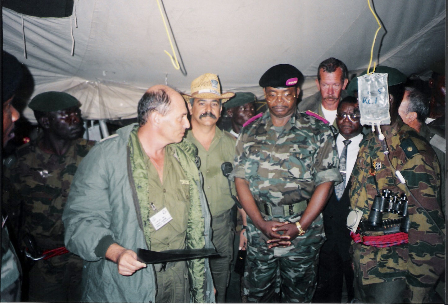 שמואל כמפקד משלחת הסיוע הרפואי לנפגעי ברצח העם ומגפות כולירע ודיזנטריה בגבול זאיר-רואנדה, עם שרי ממשלה וקצינים בכירים בצבא זאיר